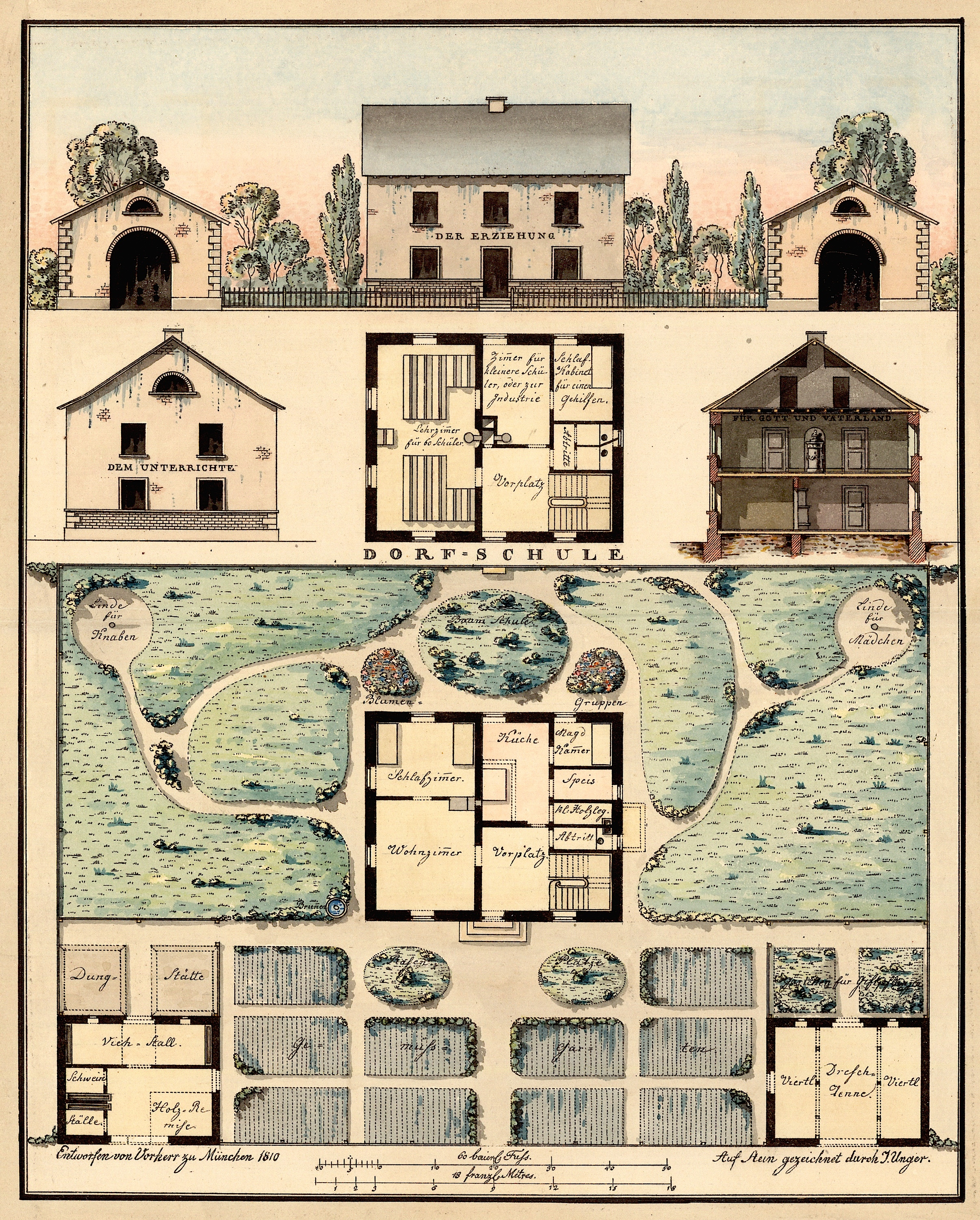 Plan einer Dorfschule von Gustav Vorherr aus dem Jahr 1810.